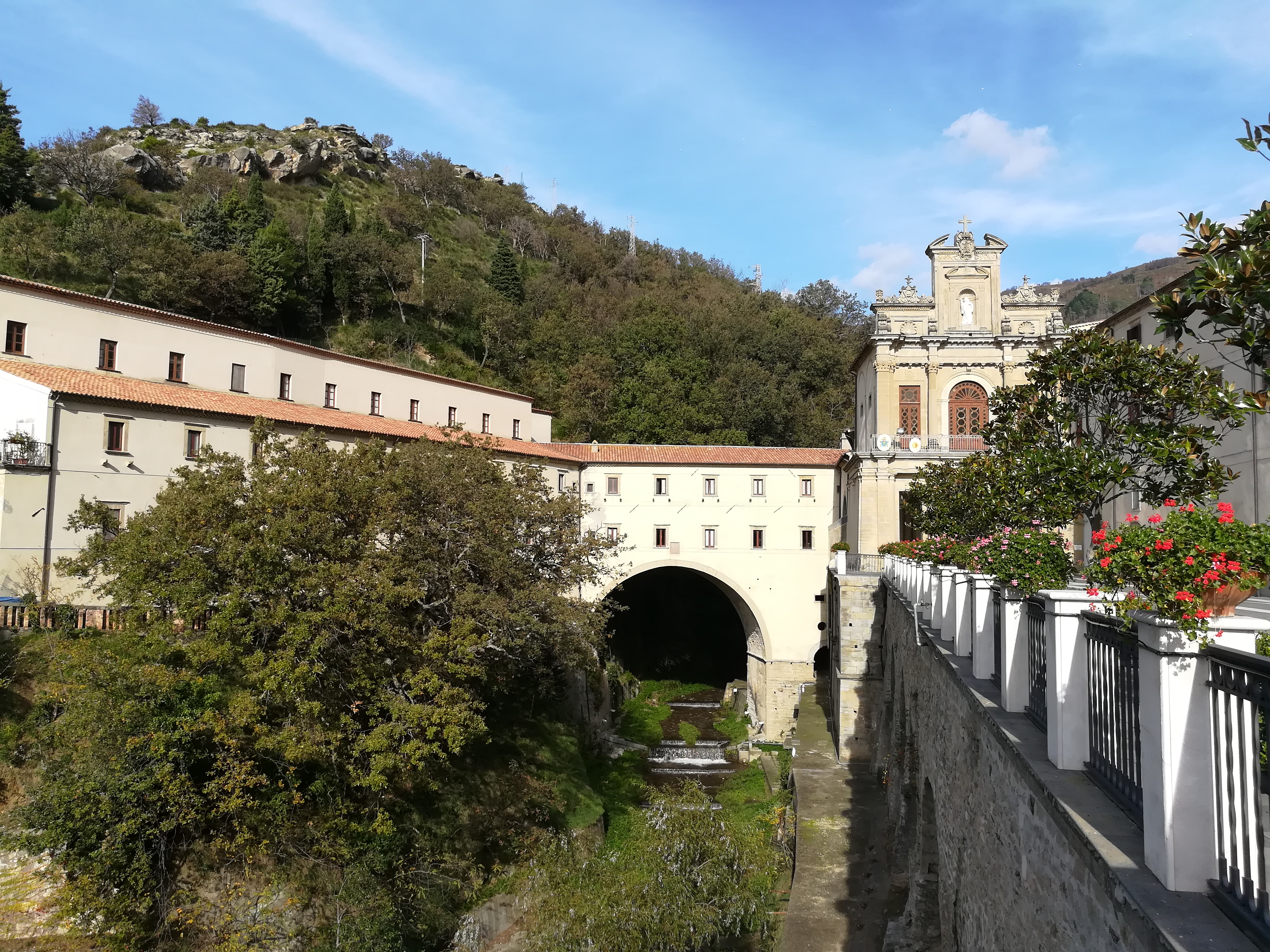 La Basilica-Santuario di San Francesco di Paola. Paola (CS)